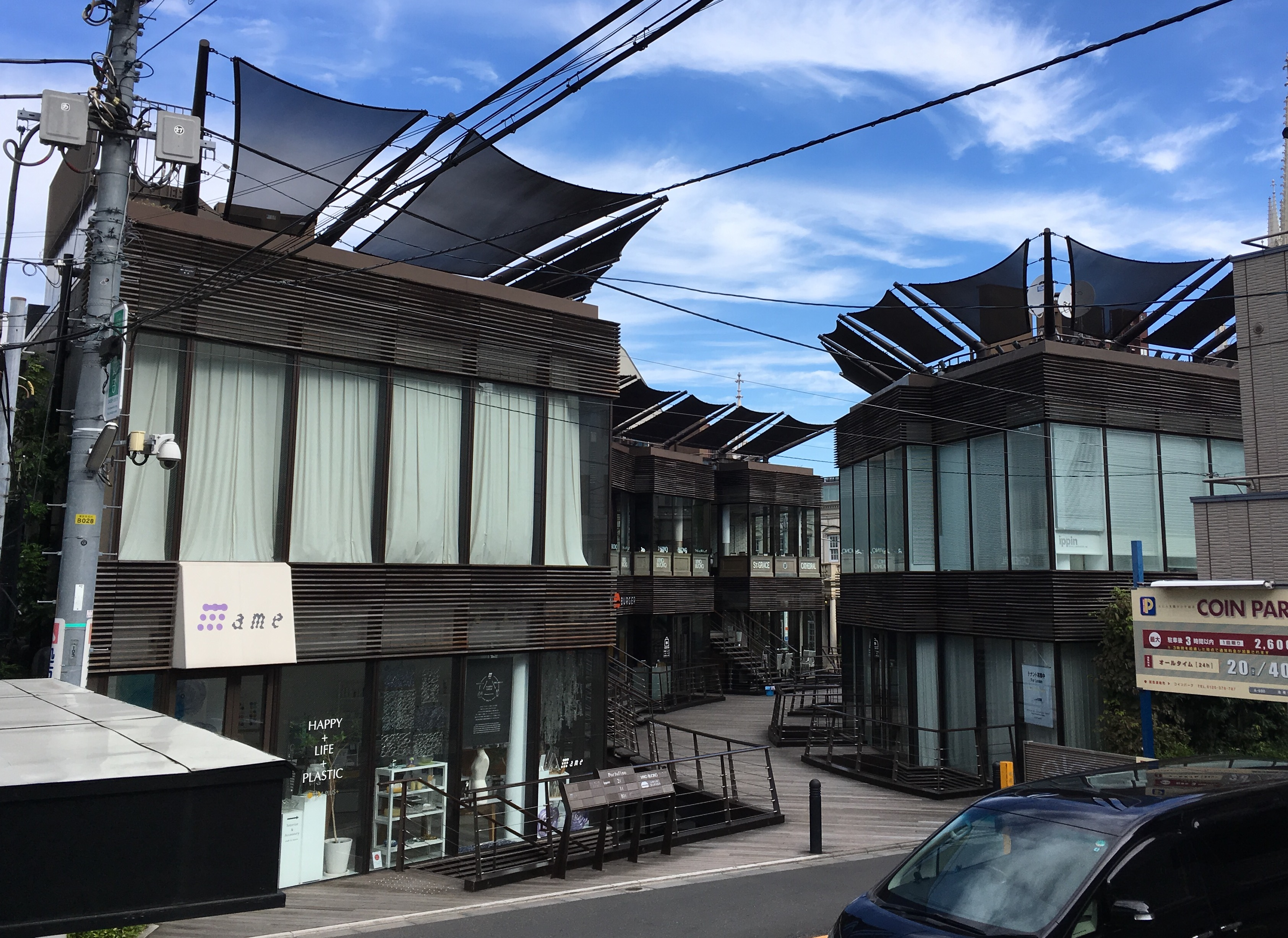 ベンジャミン・ウォーナーの作品